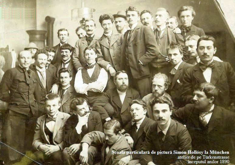 Studentii "Scolii particulare de pictura Simon Hollosy" din Munchen